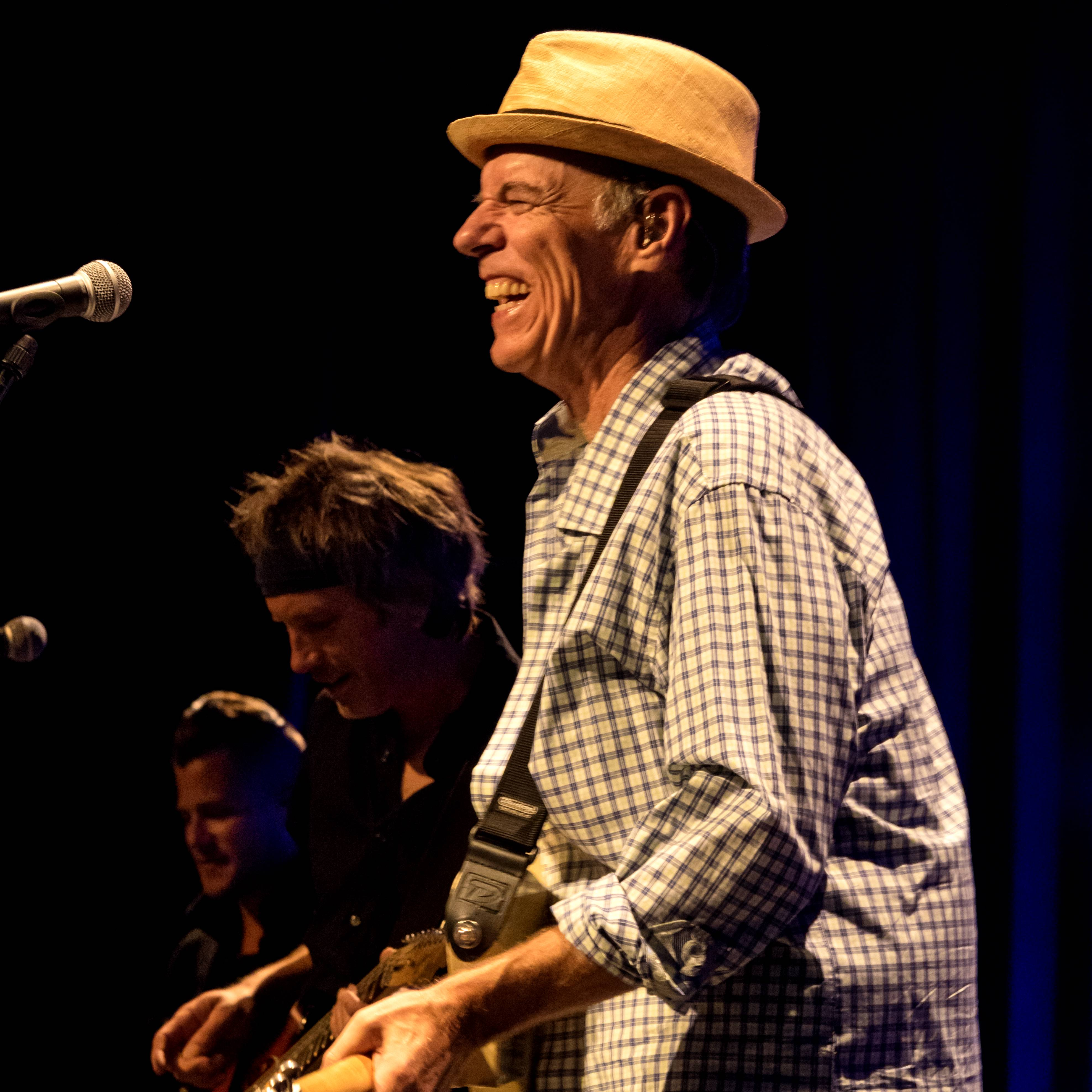 Bilder vom ZMF 2015 John Hiatt & The Combo 09. Juli 2015